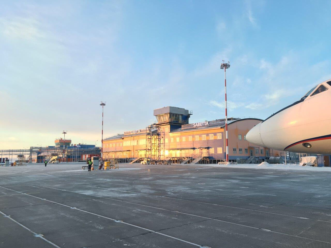 Перрон международного аэропорта Сабетта